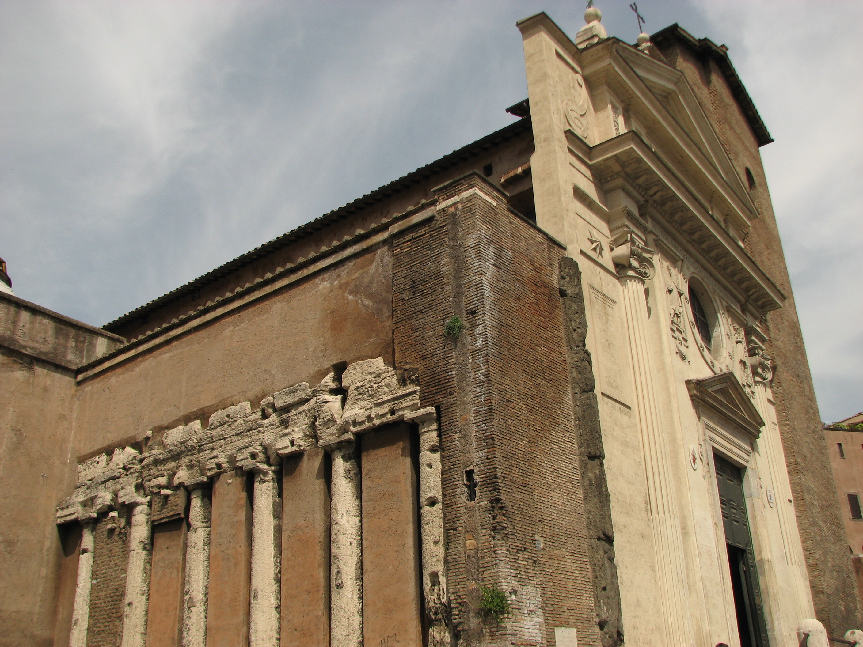 San Nicola in Carcere, Roma, Italia